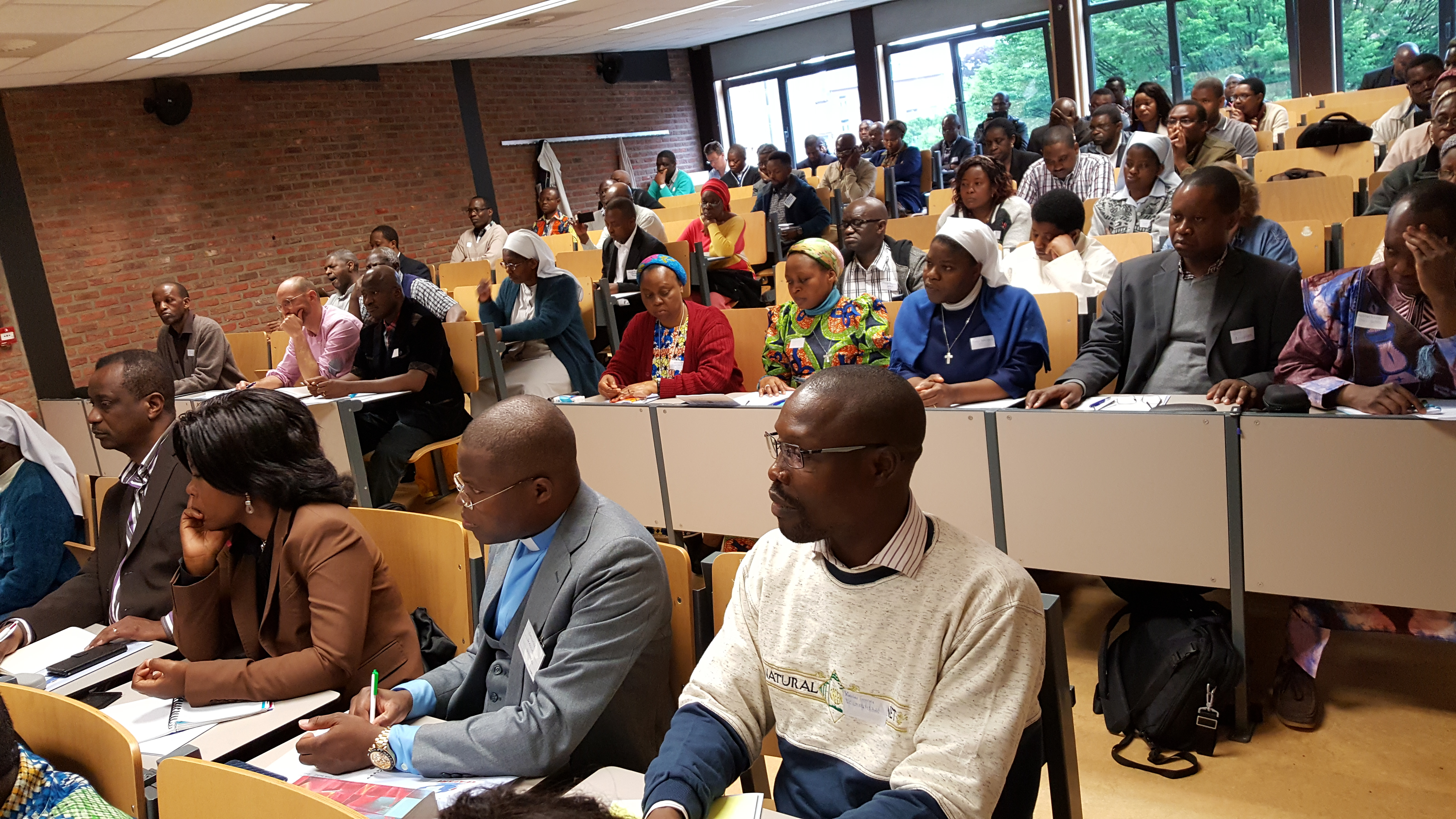 Etudiants de Lumen Vitae dans leur nouvel environnement